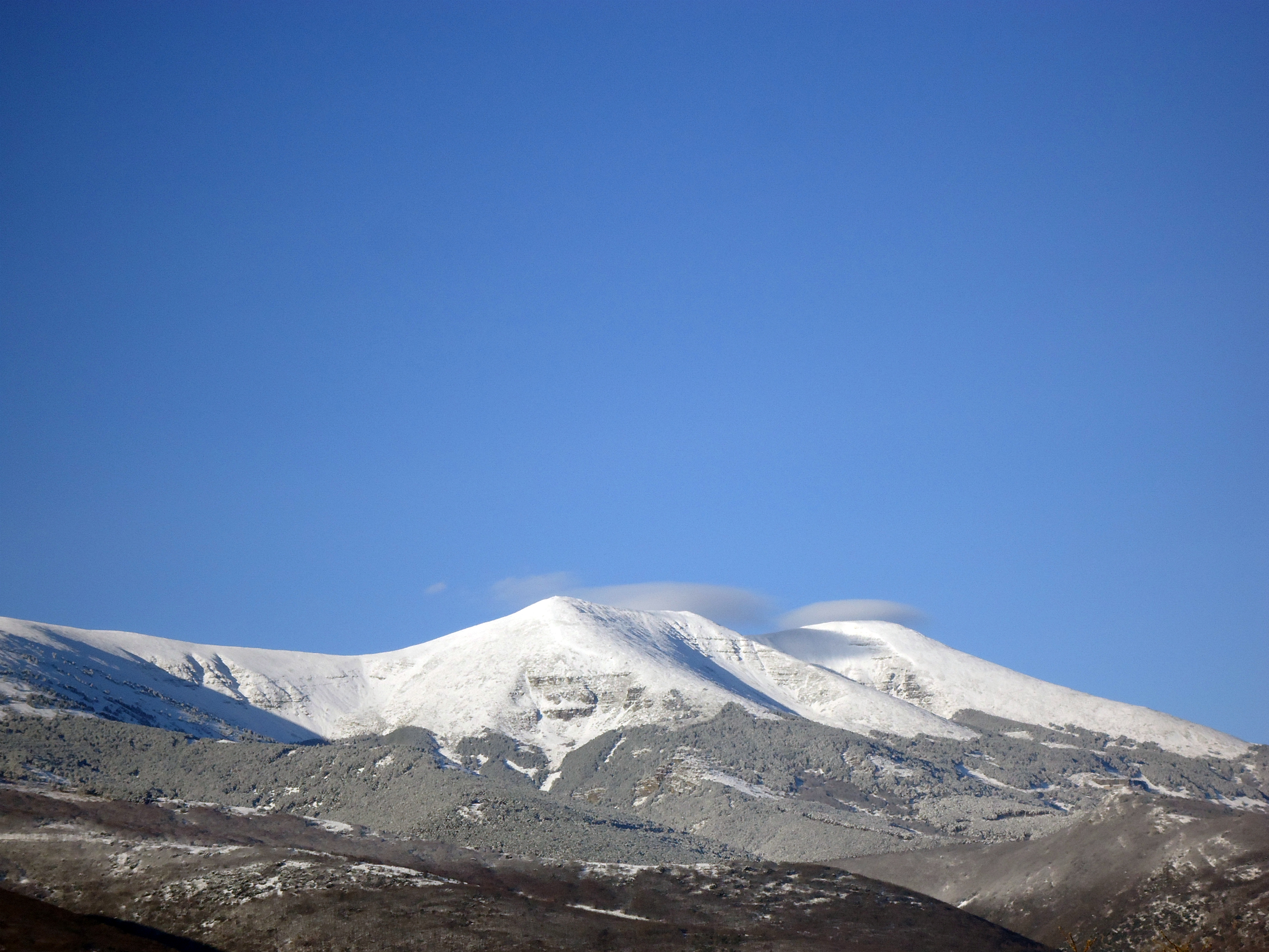 Vistas del Parque Natural del Moncayo desde la urbanización.